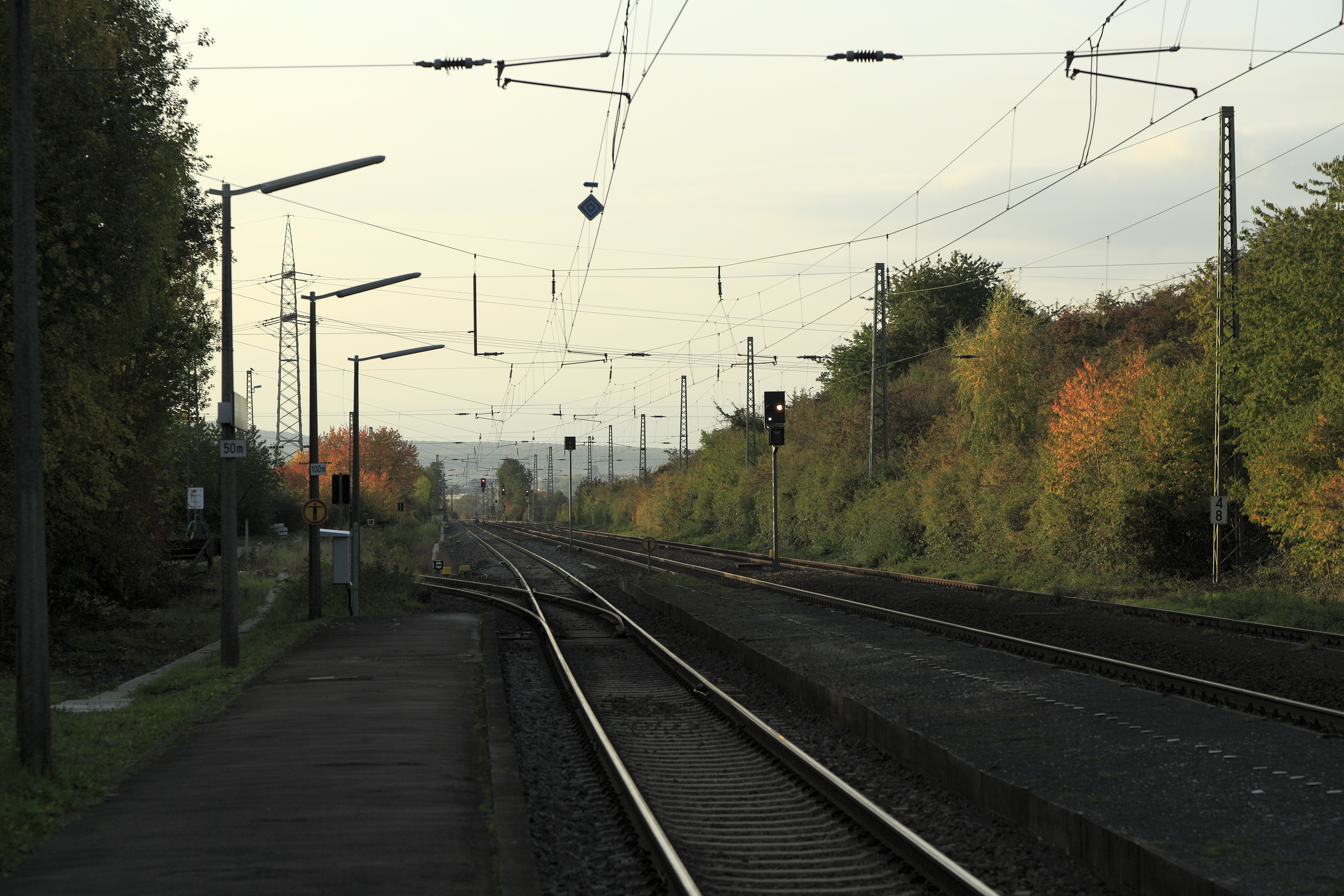 Richtung Friedberg (Hess) während der Vollsperrung für die Inbetriebnahme des eStw-Z Friedberg (Hessen). Die Weiche 19 im durchgehenden Hauptgleis Friedberg–Niddatal und die Gleissperre II wurden dabei von Fern- auf Ortsbedienung mit Schlüsselabhängigkeit umgestellt.